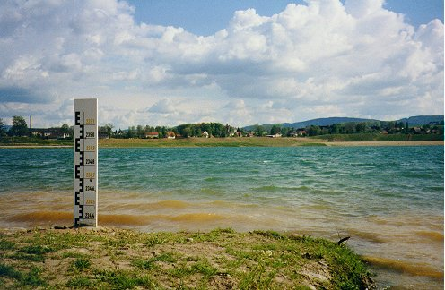 Wasserstand des Olbersdorfer Sees